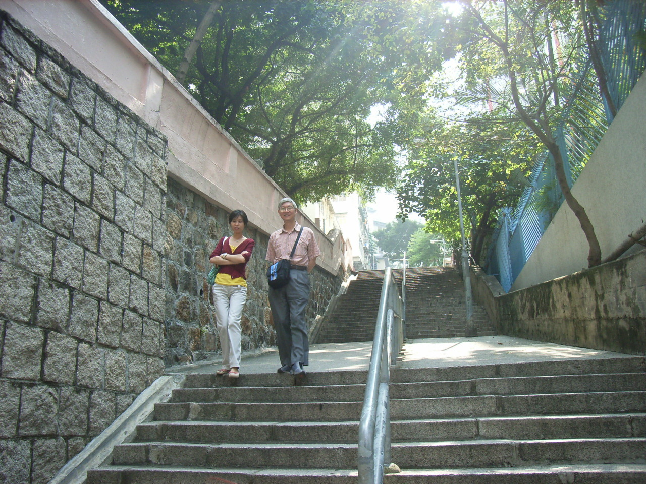 Pound Lane, Sheung Wan, Hong Kong - by Papa mimi